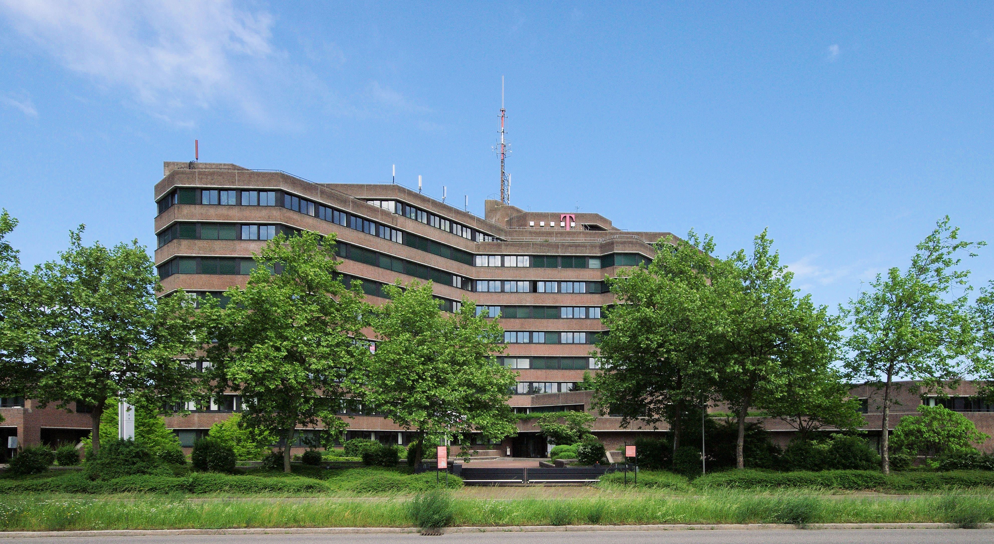 ehemalige Oberpostdirektion Freiburg, heute Sitz der Deutschen Telekom Freiburg